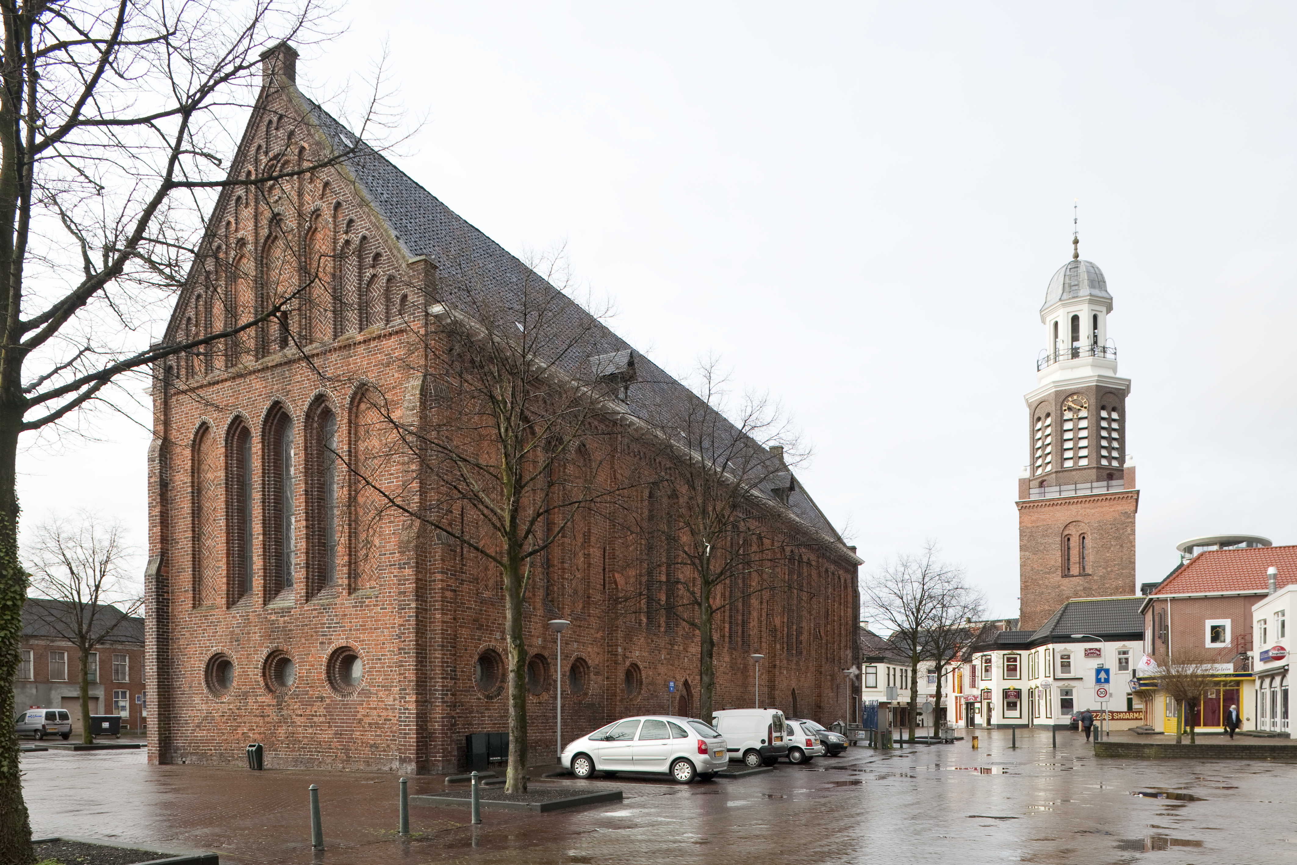 Nederlands Hervormde Kerk: Overzicht van de kerk op het Marktplein met de vrijstaande toren op de achtergrond, vanuit het noordoosten gezien